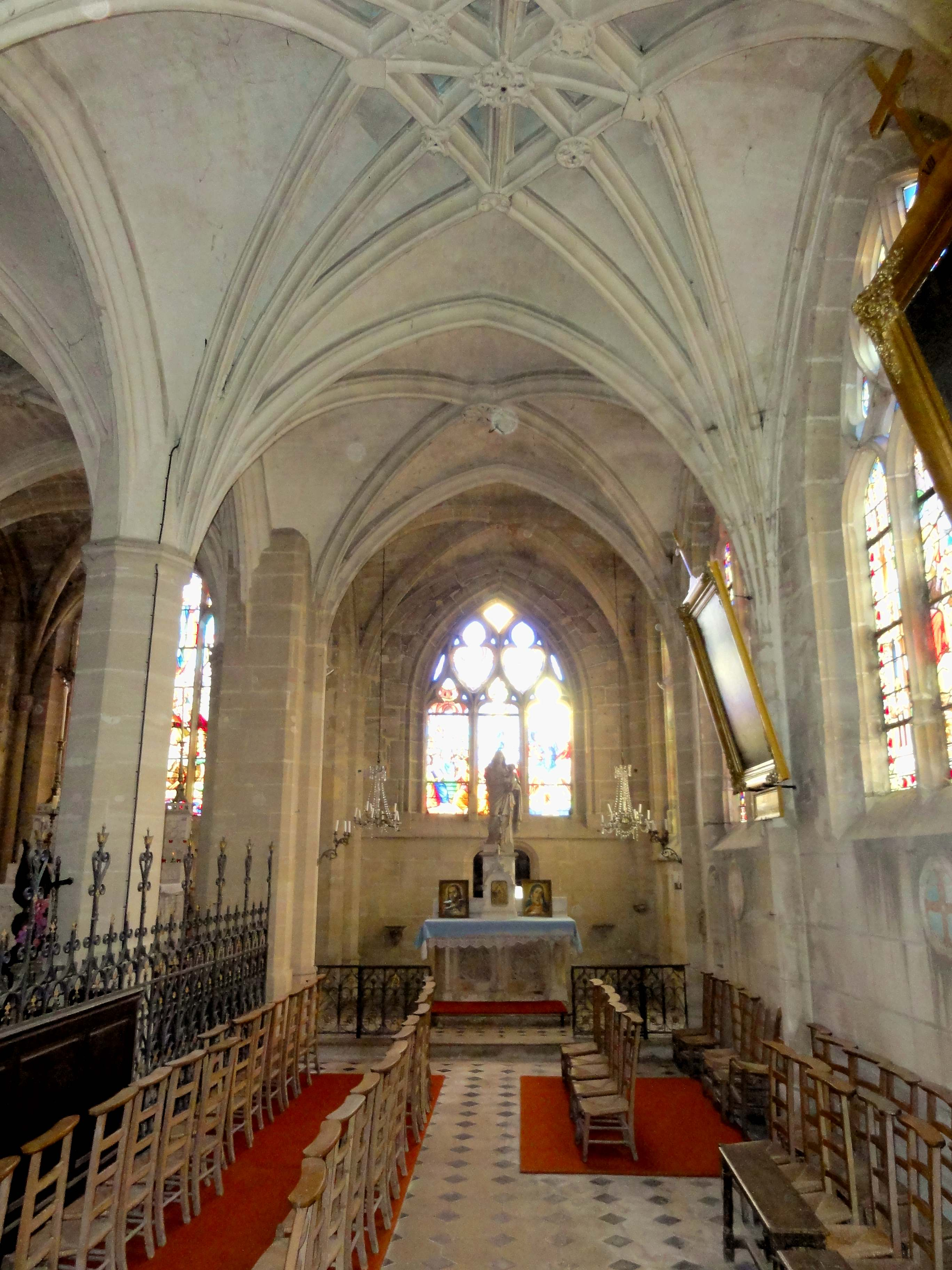 Intérieur de l'église (voir titre).